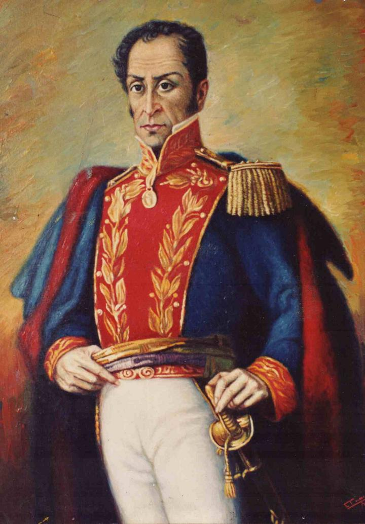 desconocido